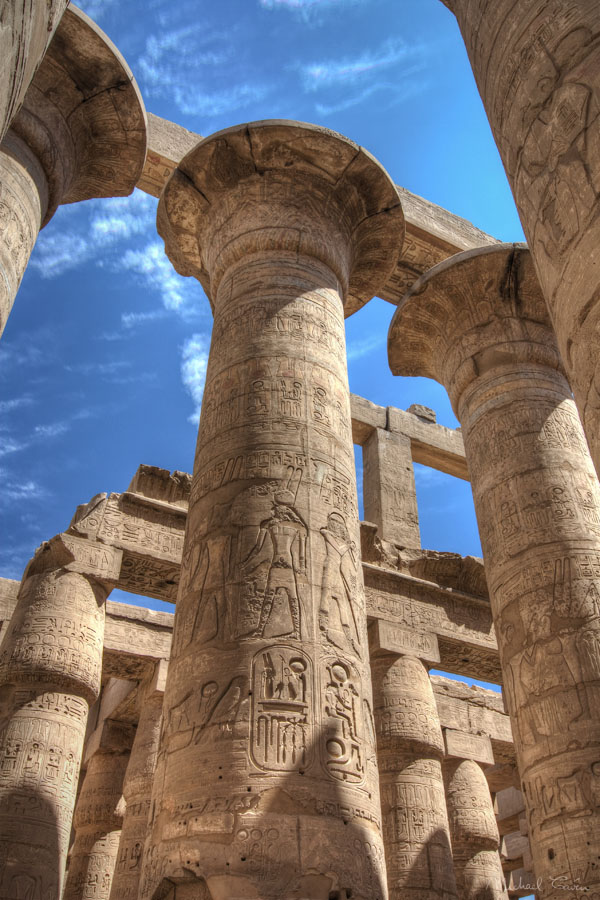 Karnak temple in Luxor, Egypt